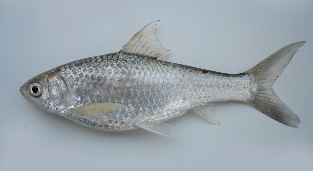 ปลาสร้อยขาว